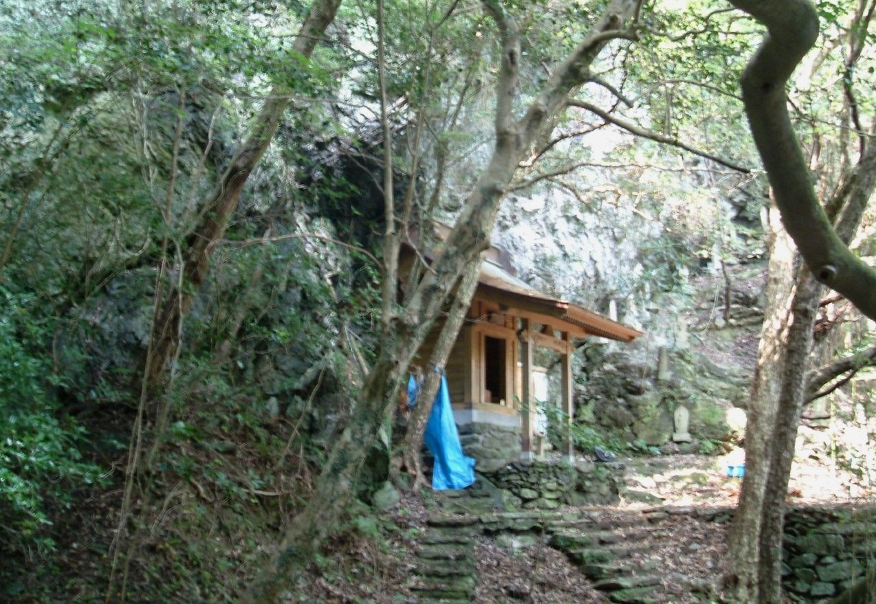 建治寺の行場